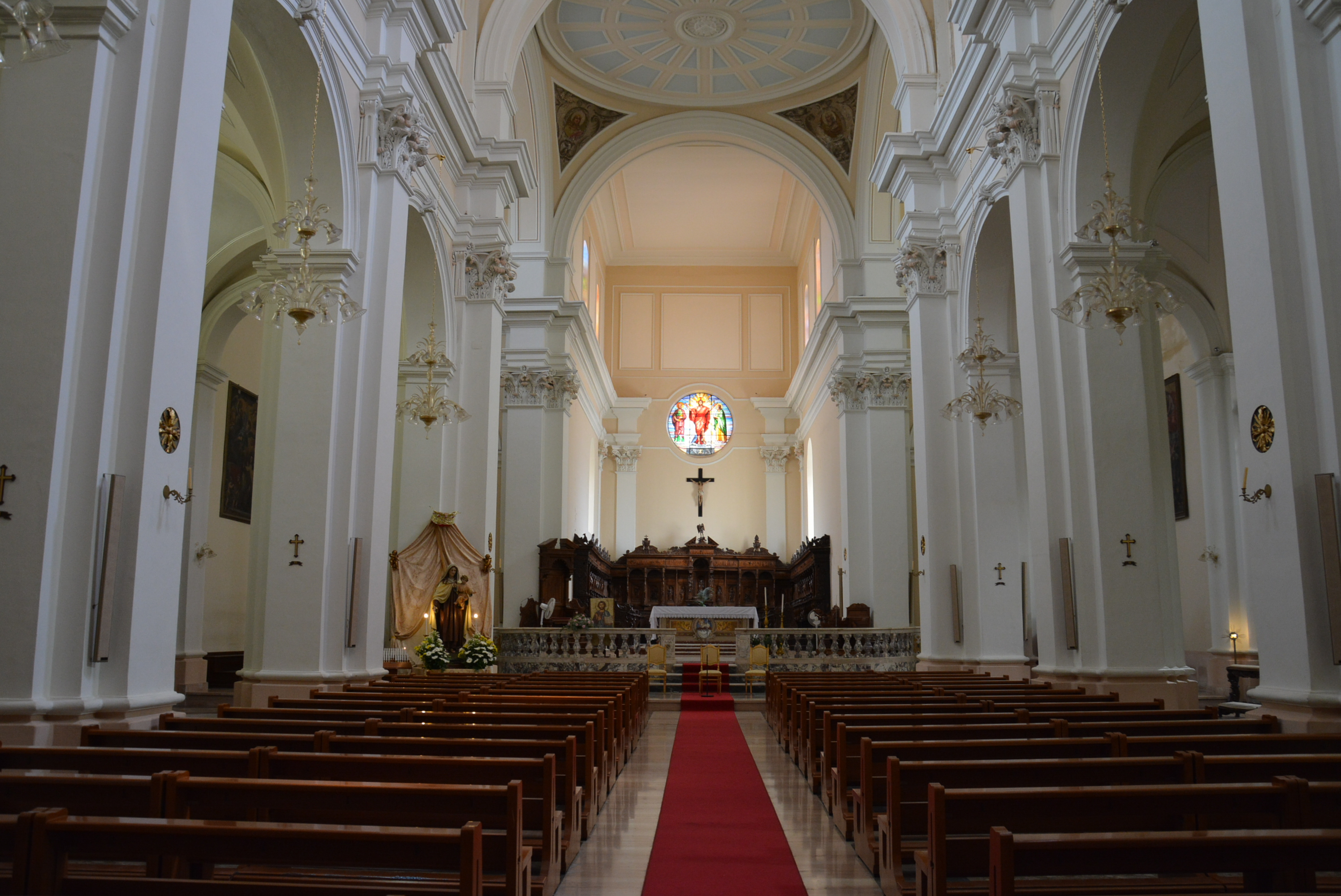 Cattedrale di Brindisi